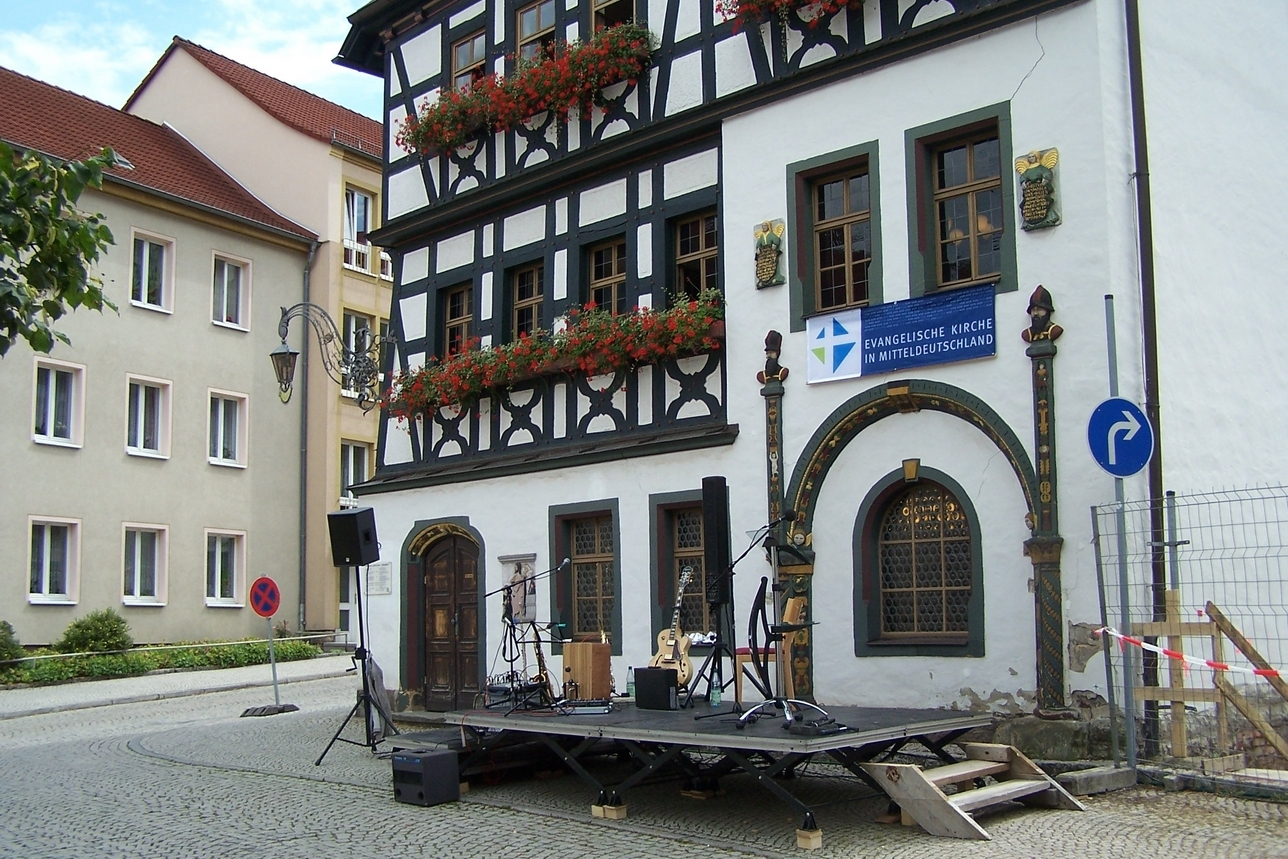 Am 12. August 2013 wurde in der Baugrube am Lutherhaus die feierliche Grundsteinlegung für den Bau eines Nebengebäudes und die Lückenschlussbebauung auf der Südseite des Platzes vollzogen.